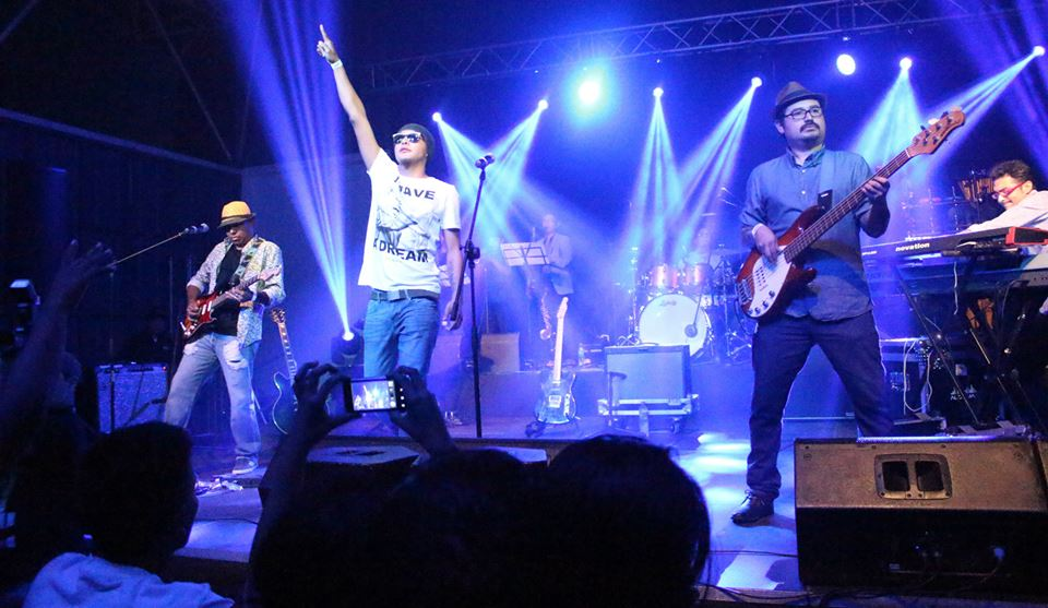 Los Tachos en la presentación del disco "Seducción"